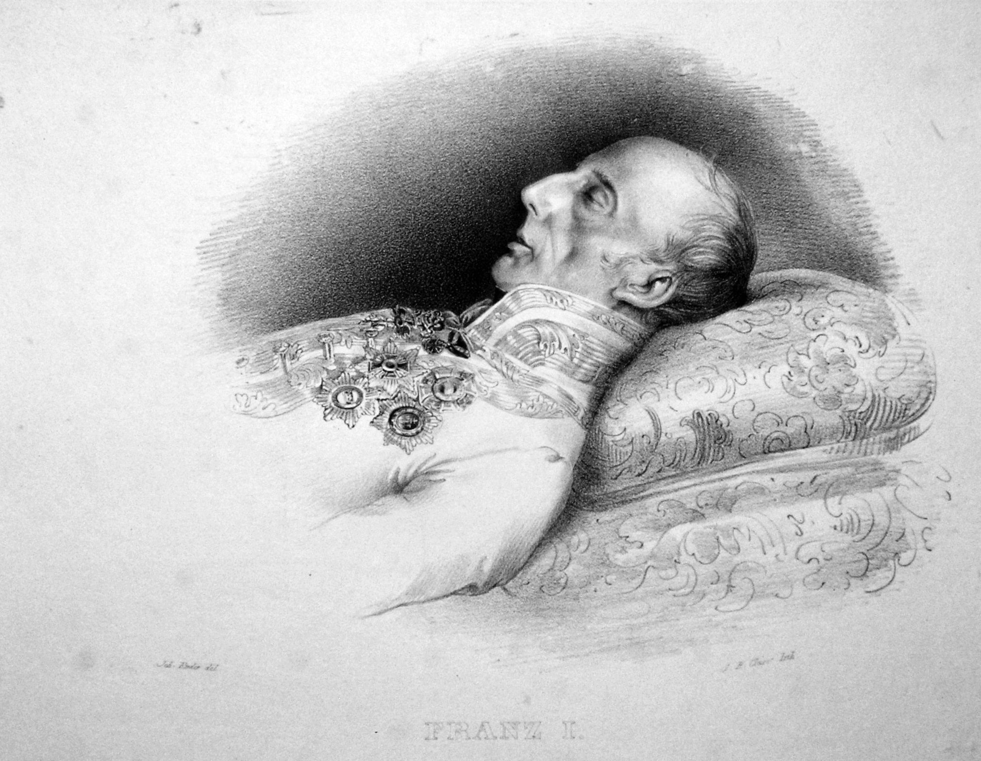 Kaiser Franz I. von Österreich (1768-1835) am Totenbett. Lithographie von Johann Baptist Clarot, 1835, nach Johann Ender.